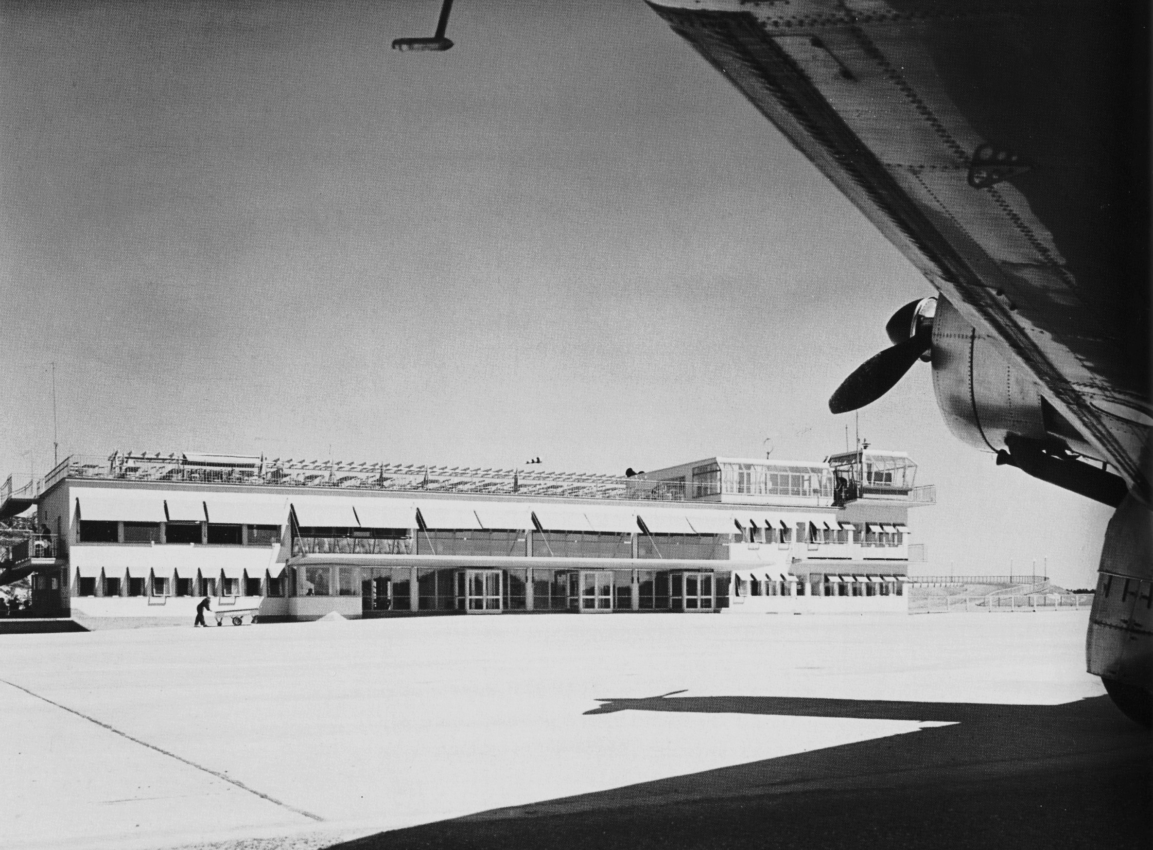 Bromma flygplats, stationsbyggnaden, exteriör